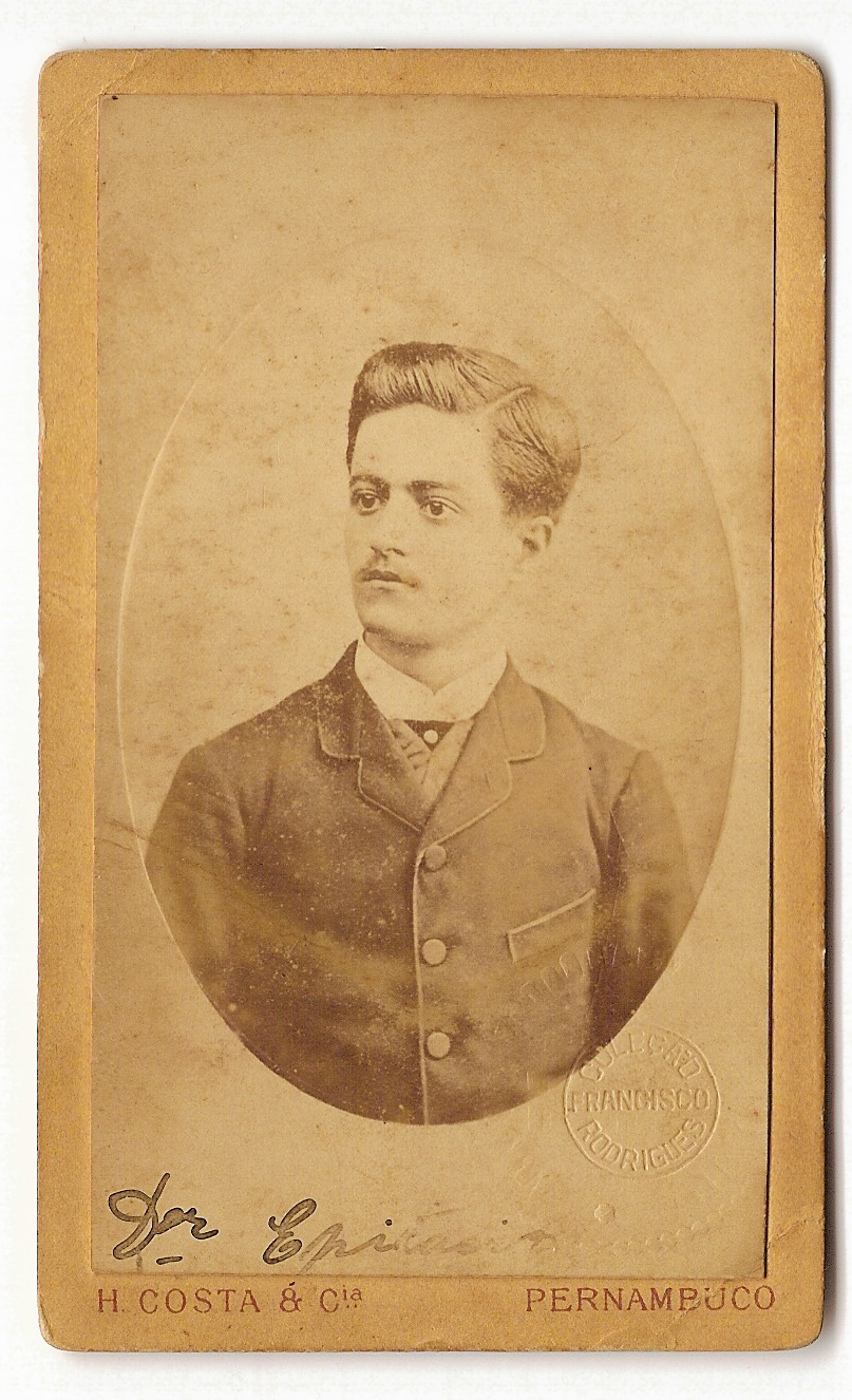 Epitácio Lindolpho da Silva [bacaharel em 1886, prof. da Faculdade de Direito do Recife e presidente da república]. (Col. Francisco Rodrigues; FR-3132)